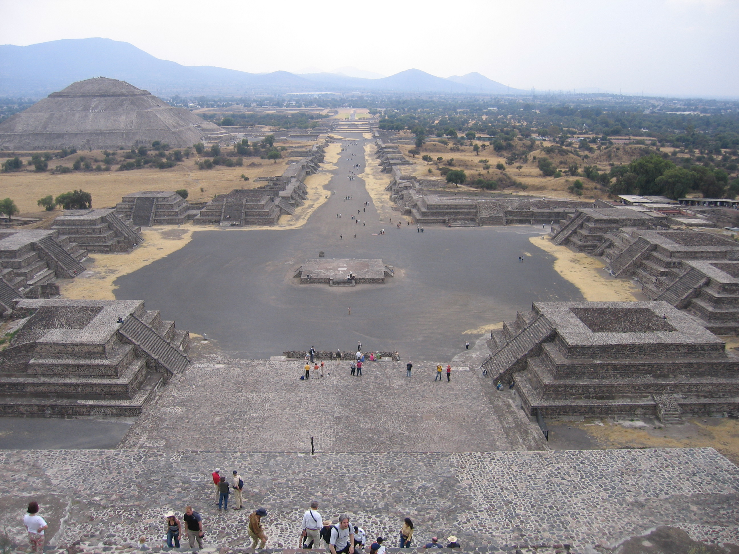 Teotihuacán seen from Pirámide de la Luna.